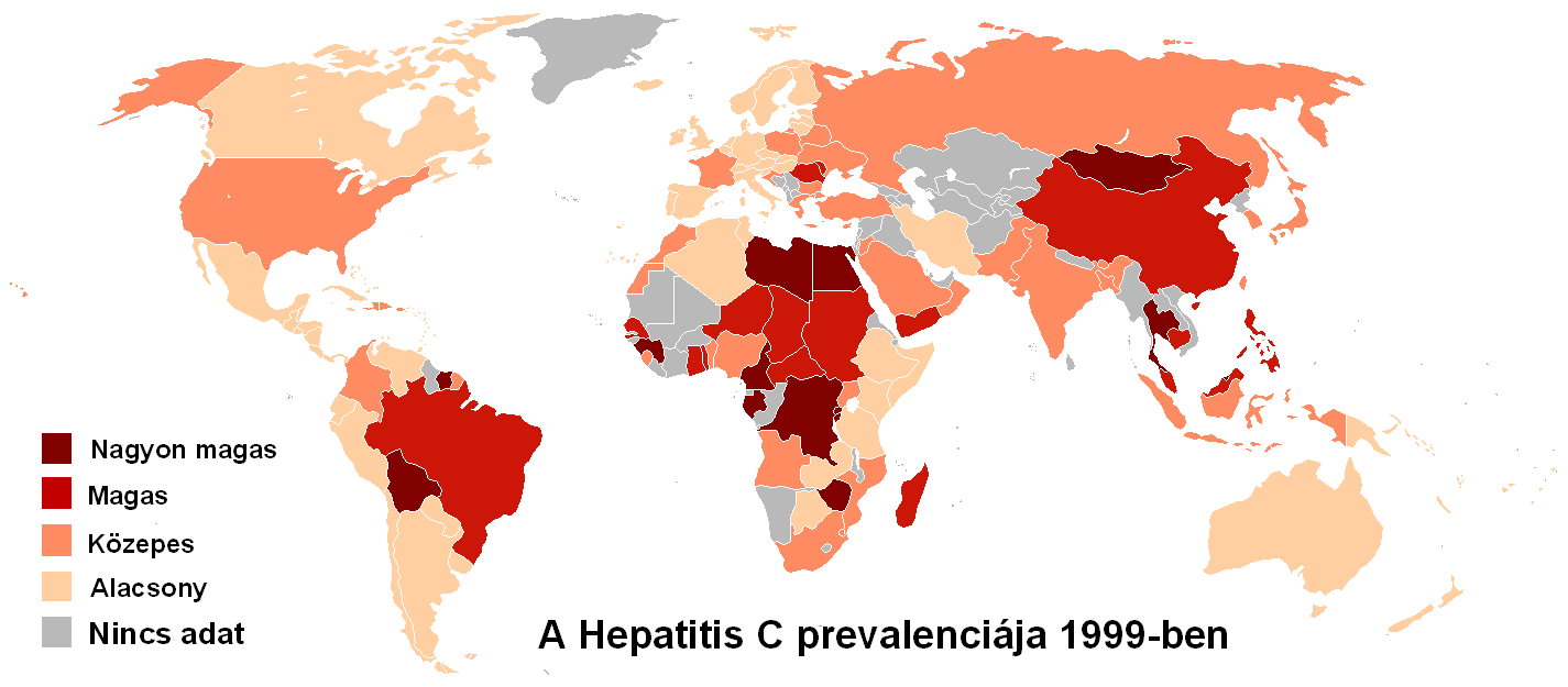 A Hepatitis C prevalenciája 1999-ben.